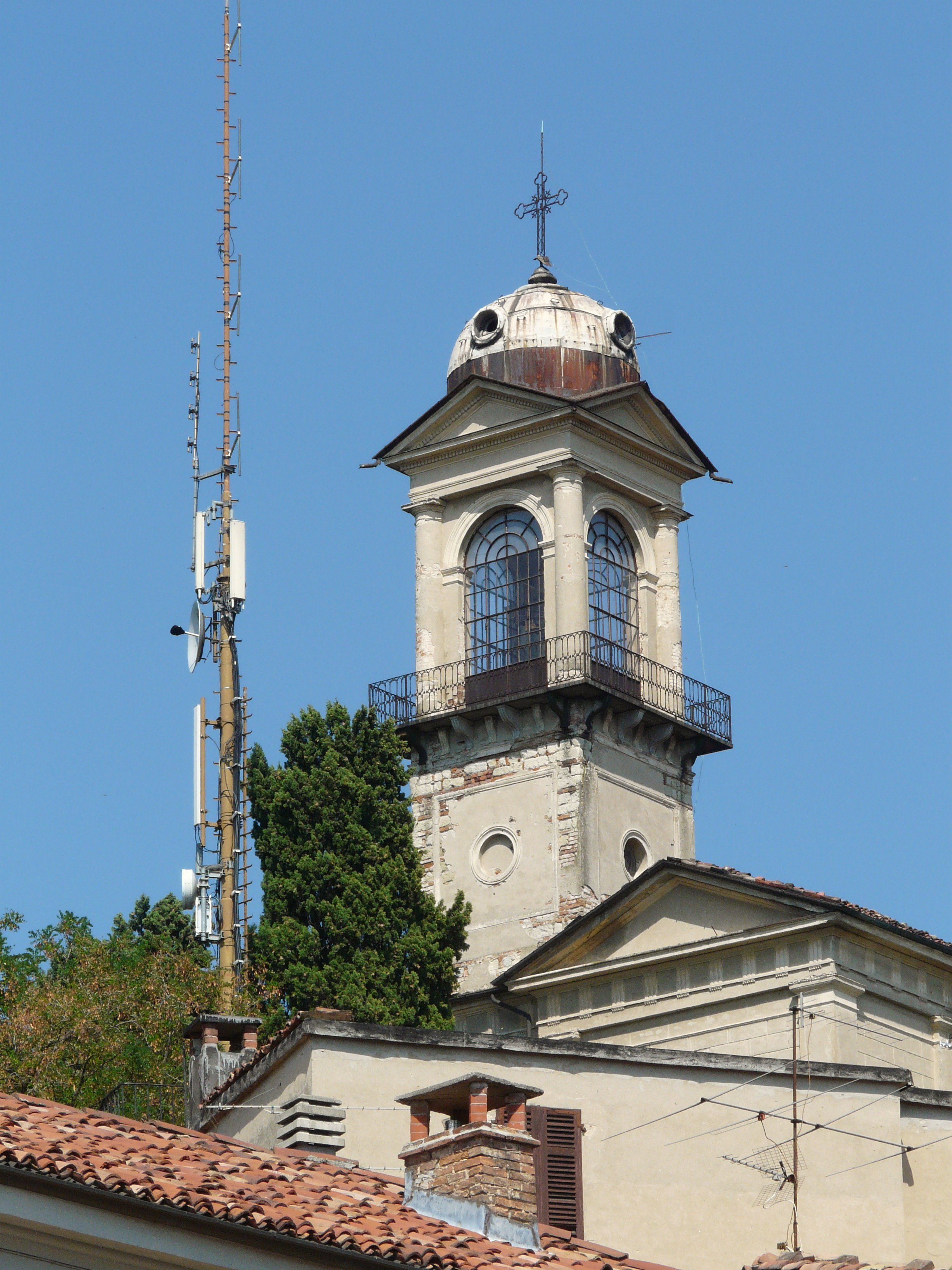 Campanile presso l'ostello di Vignale Monferrato, Piemonte, Italia